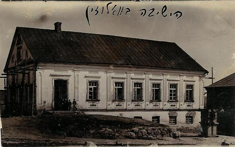 Volozhin yeshiva, Valozhyn, Belarus.